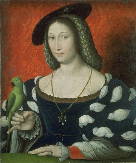 Portrait of Marguerite d'Angoulême (1492-1549)